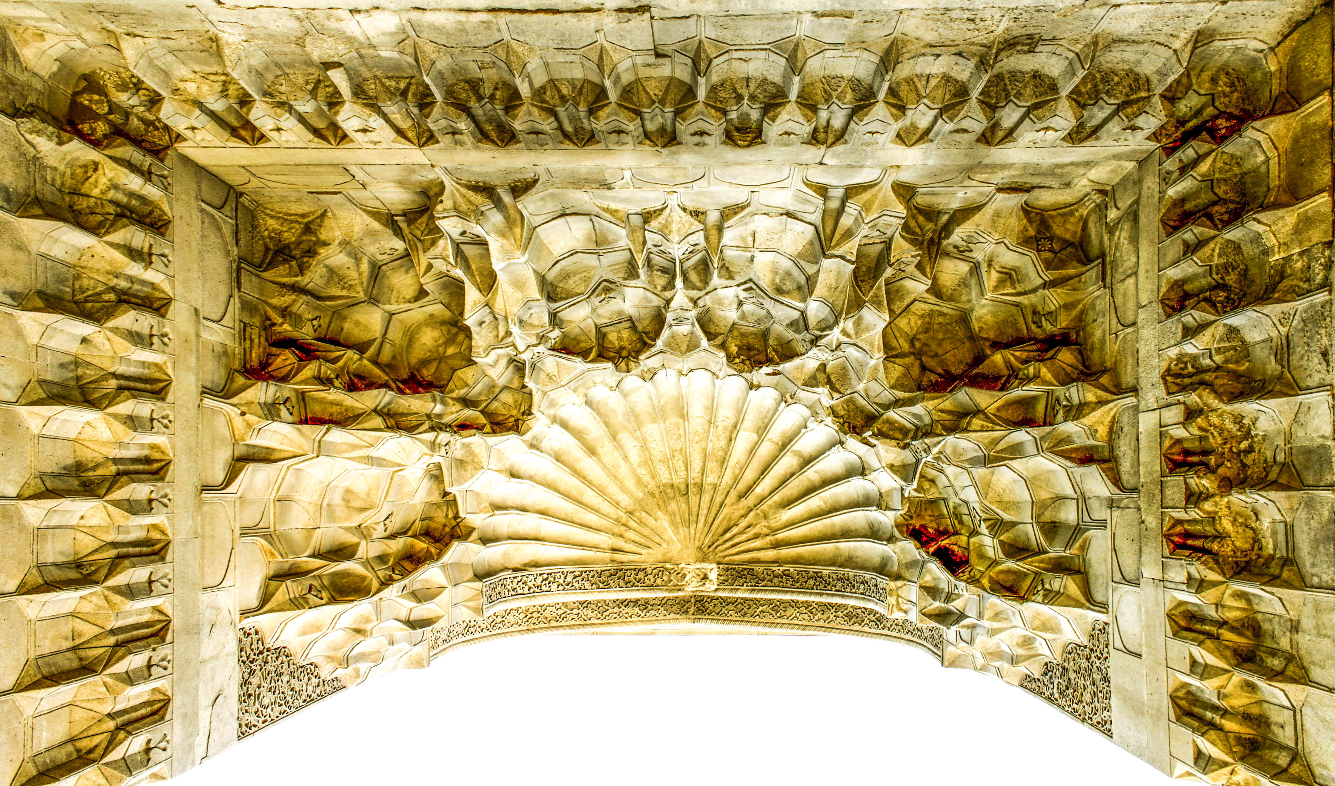 Divanxan portalında stalaktitlər